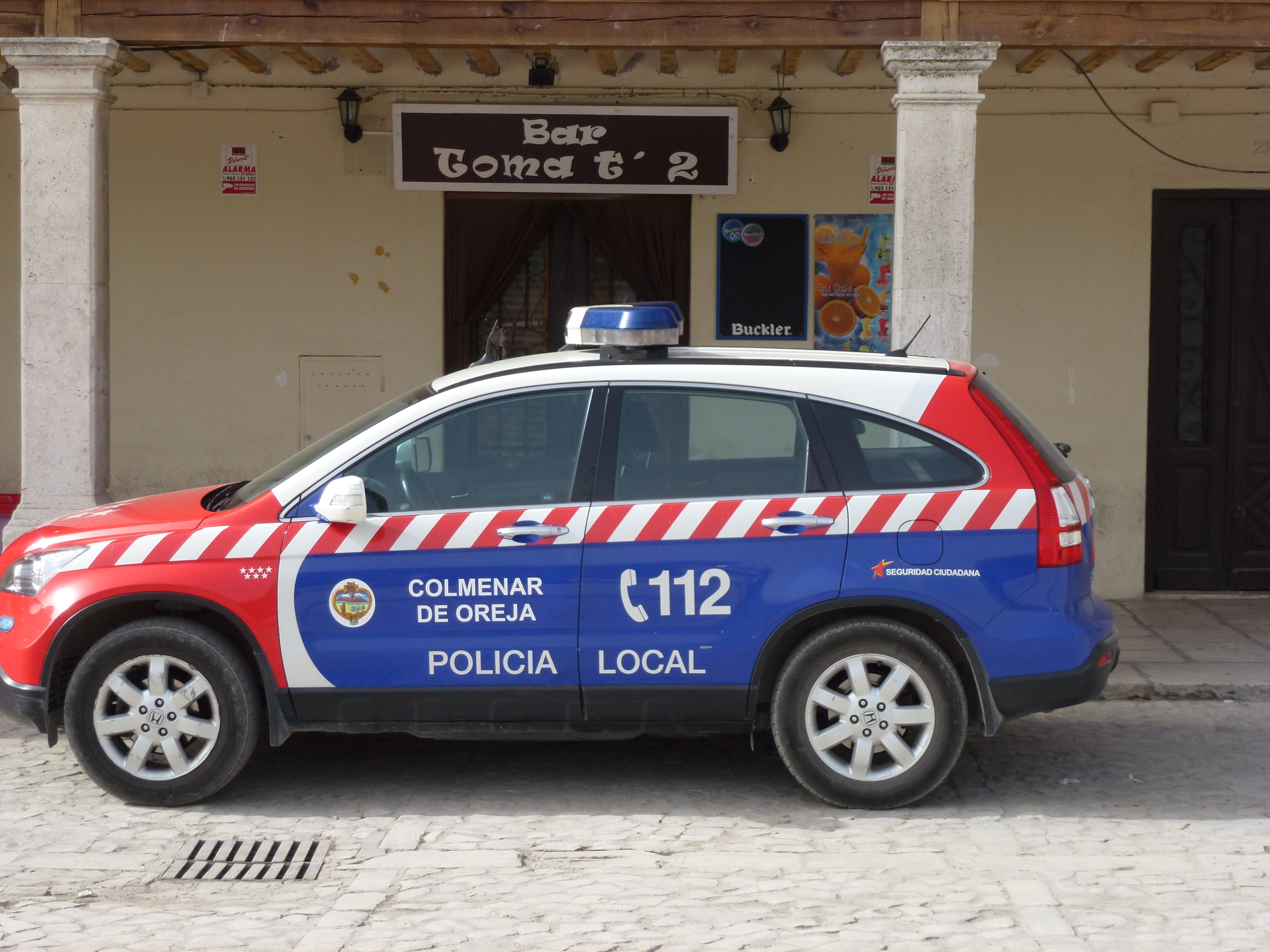 Vehículo utilizado por la policía municipal de Colmenar de Oreja, Madrid, España.